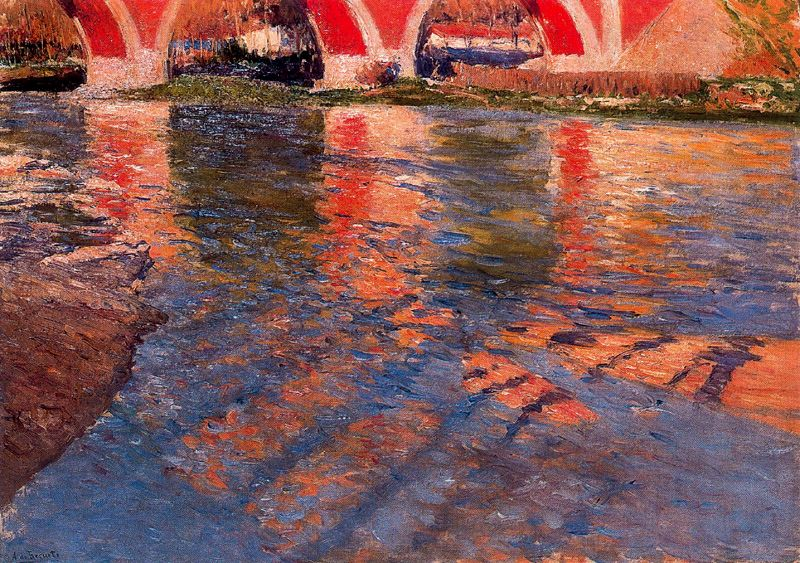 Pintura de Paisajes y vistas